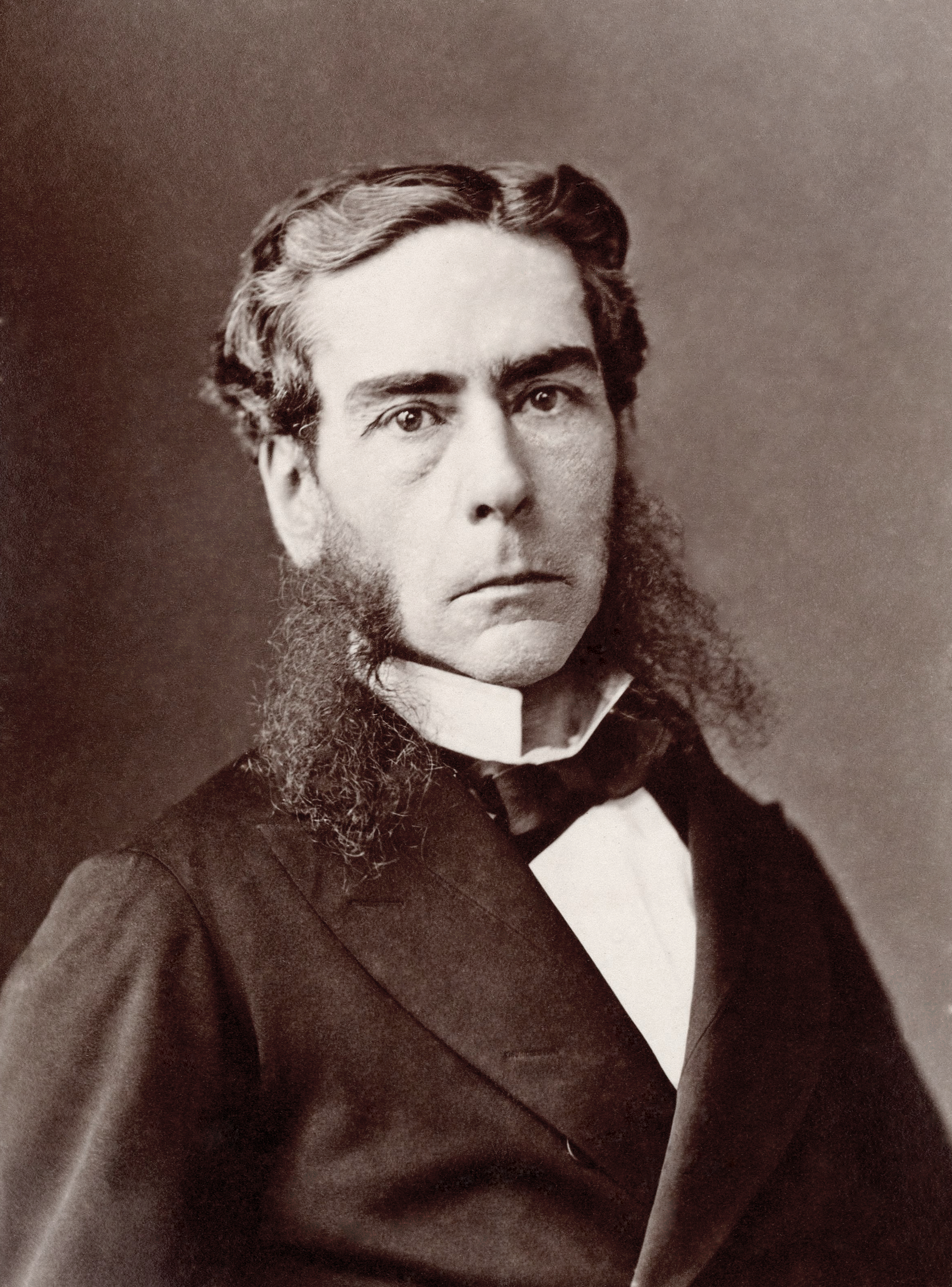 Eugène Mouton (dit "Mérinos" (1823 - 1902), magistrat, écrivain humoristique et de science fiction, auteur pour la jeunesse français